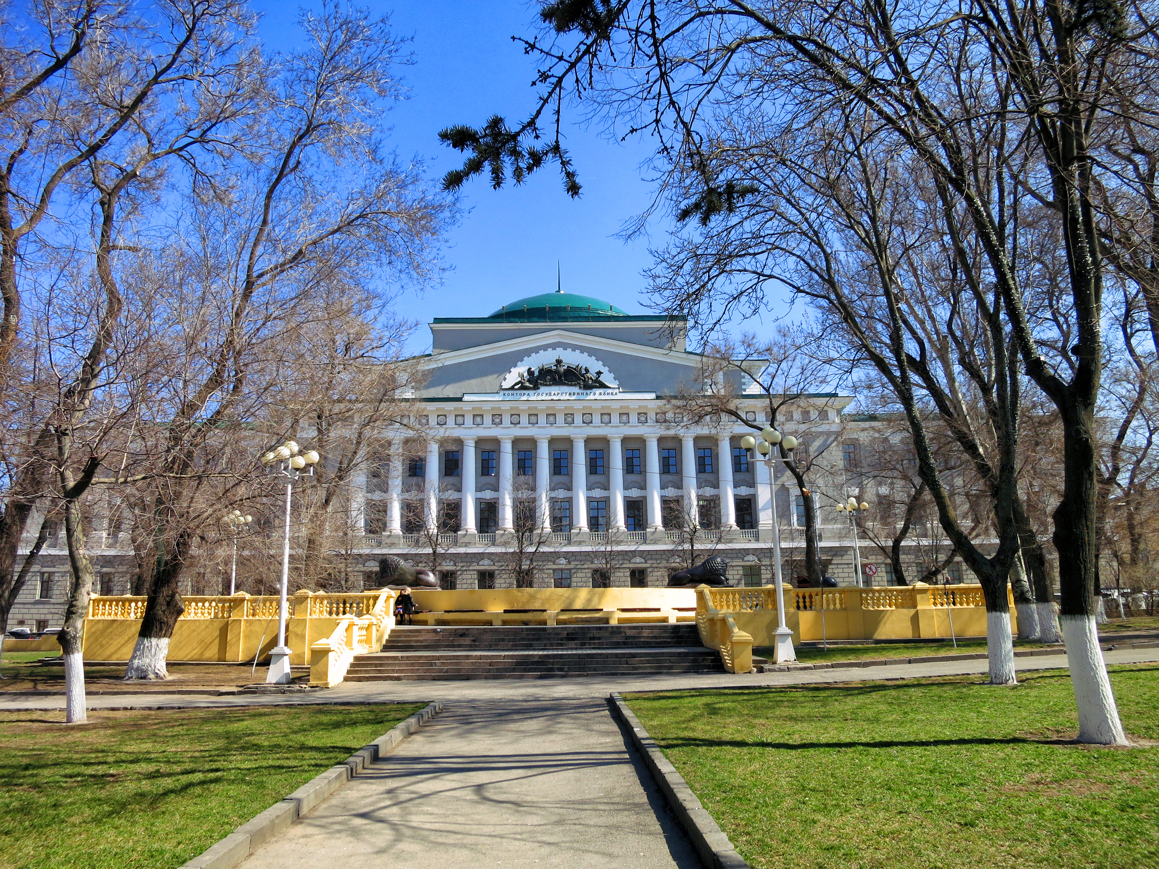 Здание банка: улица Соколова, 28, Ростов-на-Дону, Ростовская область